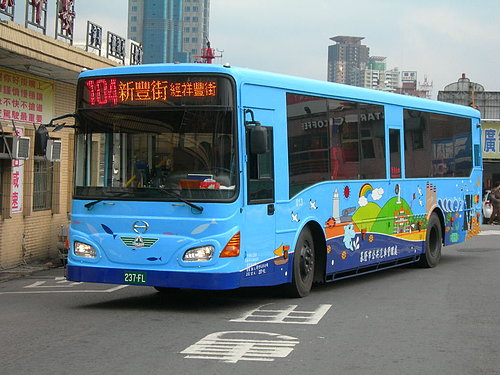 基隆市公共汽車管理處日野RN大客車237-FL停靠基隆市公車總站。